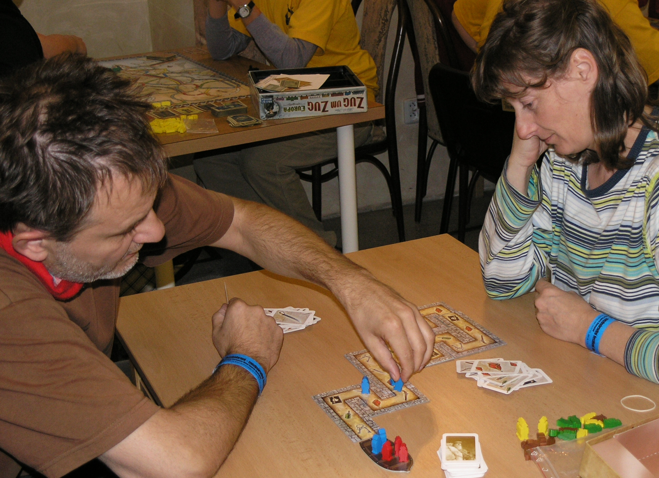 Deskohraní 2008